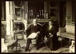 Baron et Baronne Denys Cochin Domaine public